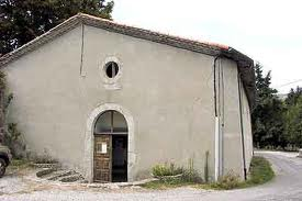 Plaque commémorative ce trouvant dans le temple de la pervenche où nous retrouvons Jean BERNARD